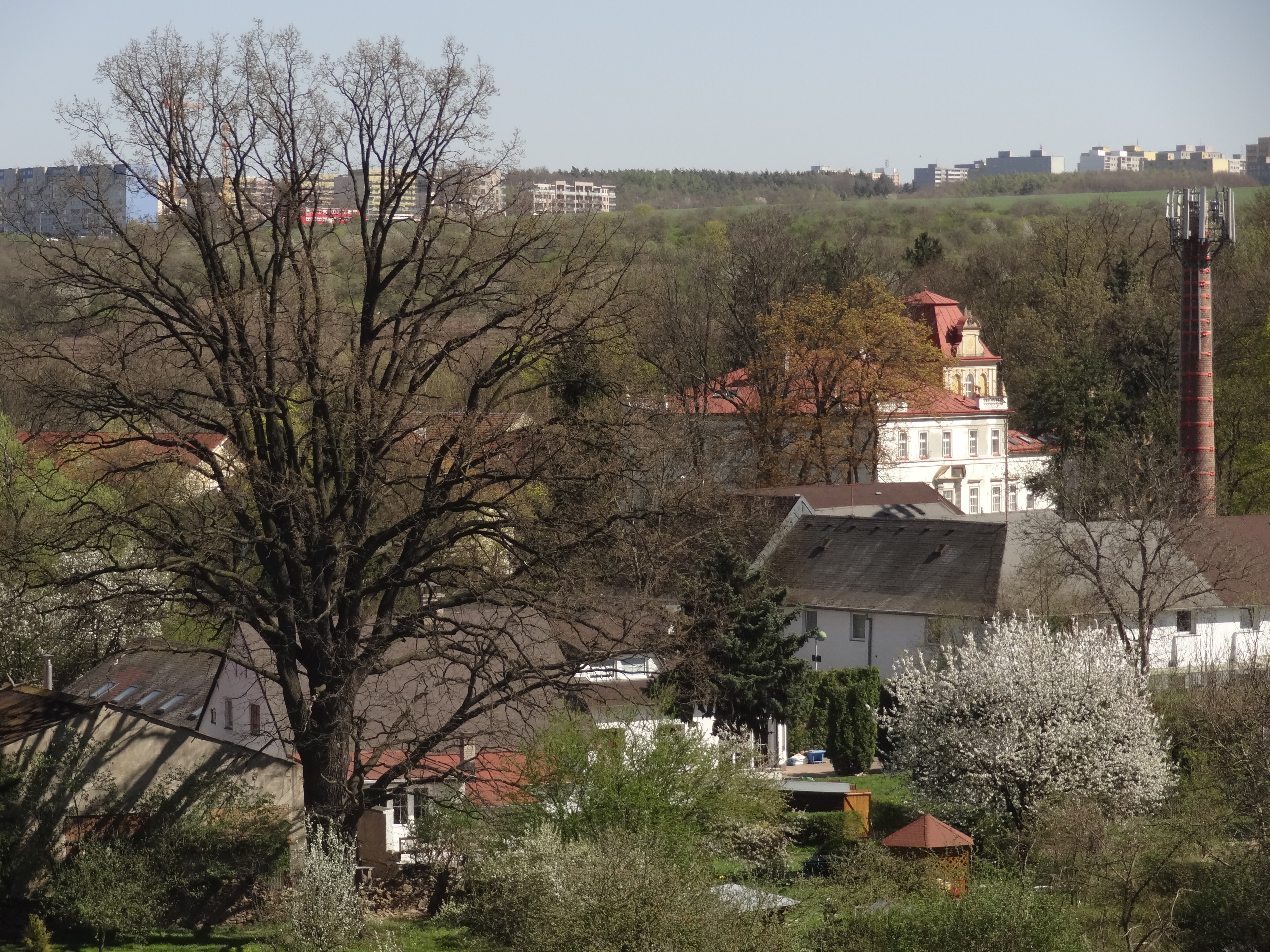 Památný dub letní v zahradě domu čp. 59 v Záběhlické ul. v Praze-Záběhlicích. podle souřadnic pohled z ulice Horní Chaloupky.